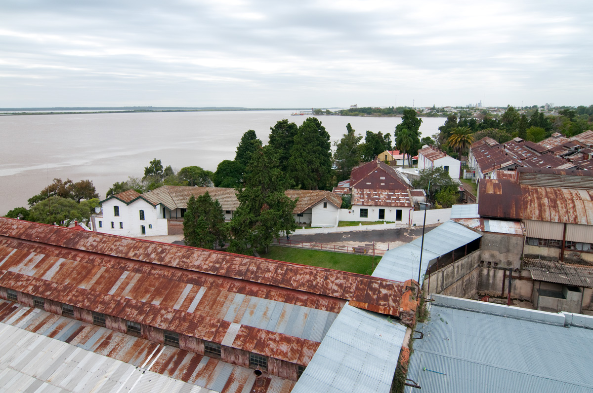 Complejo Industrial Anglo (instalación fabril y puerto) Barrio Anglo, La Pandilla, Zona del Golf, Camino de Tropa, Corrales, Zona de las Romerías Basurero Histórico, Zonas naturales: barrancas y espacios verdes. Ubicada en el departamento de Río Negro